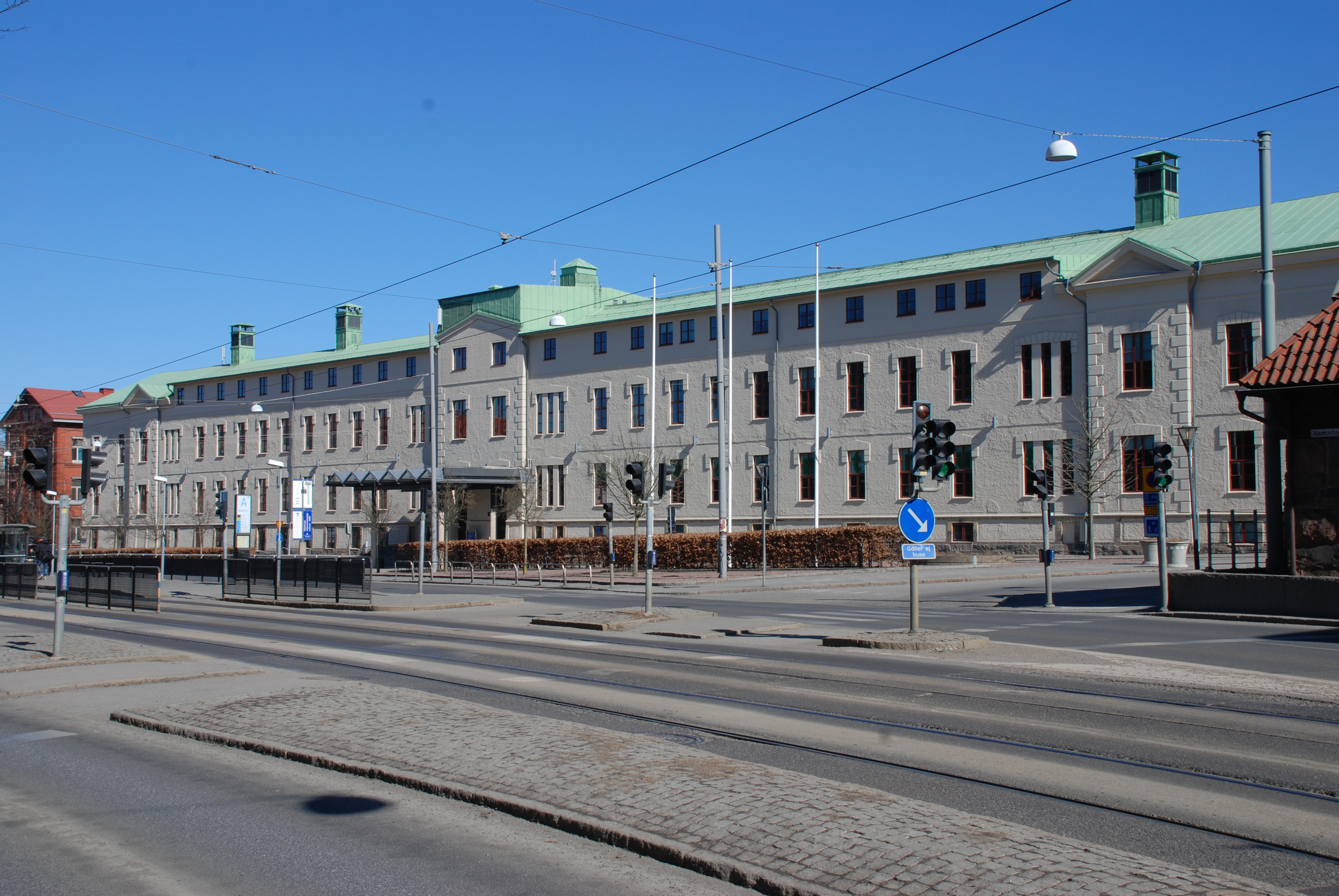 Vasa sjukhus, numera Chalmers Vasa, Aschebergsgatan 44 i Göteborg.